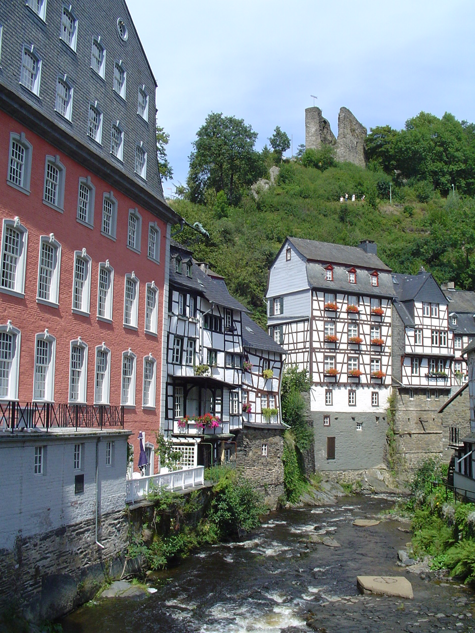 Stadtansichten von Monschau, NRW, Deutschland